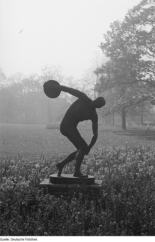 Original image description from the Deutsche FotothekEine Kopie des Diskobolos im Park von Markkleeberg